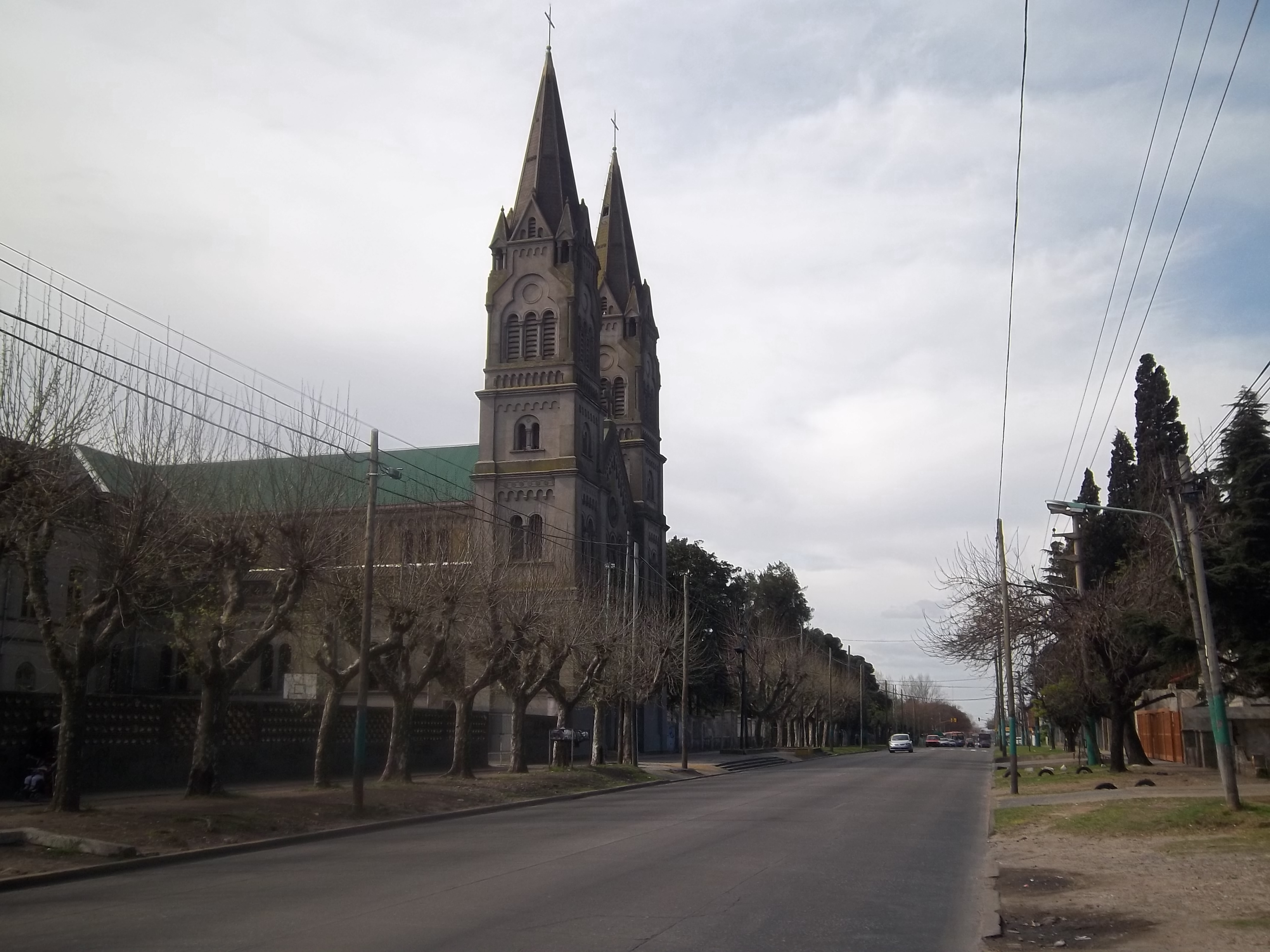 Iglesia de la Santísima Trinidad y Avenida San Martín en Rafael Calzada, partido de Almirante Brown, provincia de Buenos Aires, Argentina.